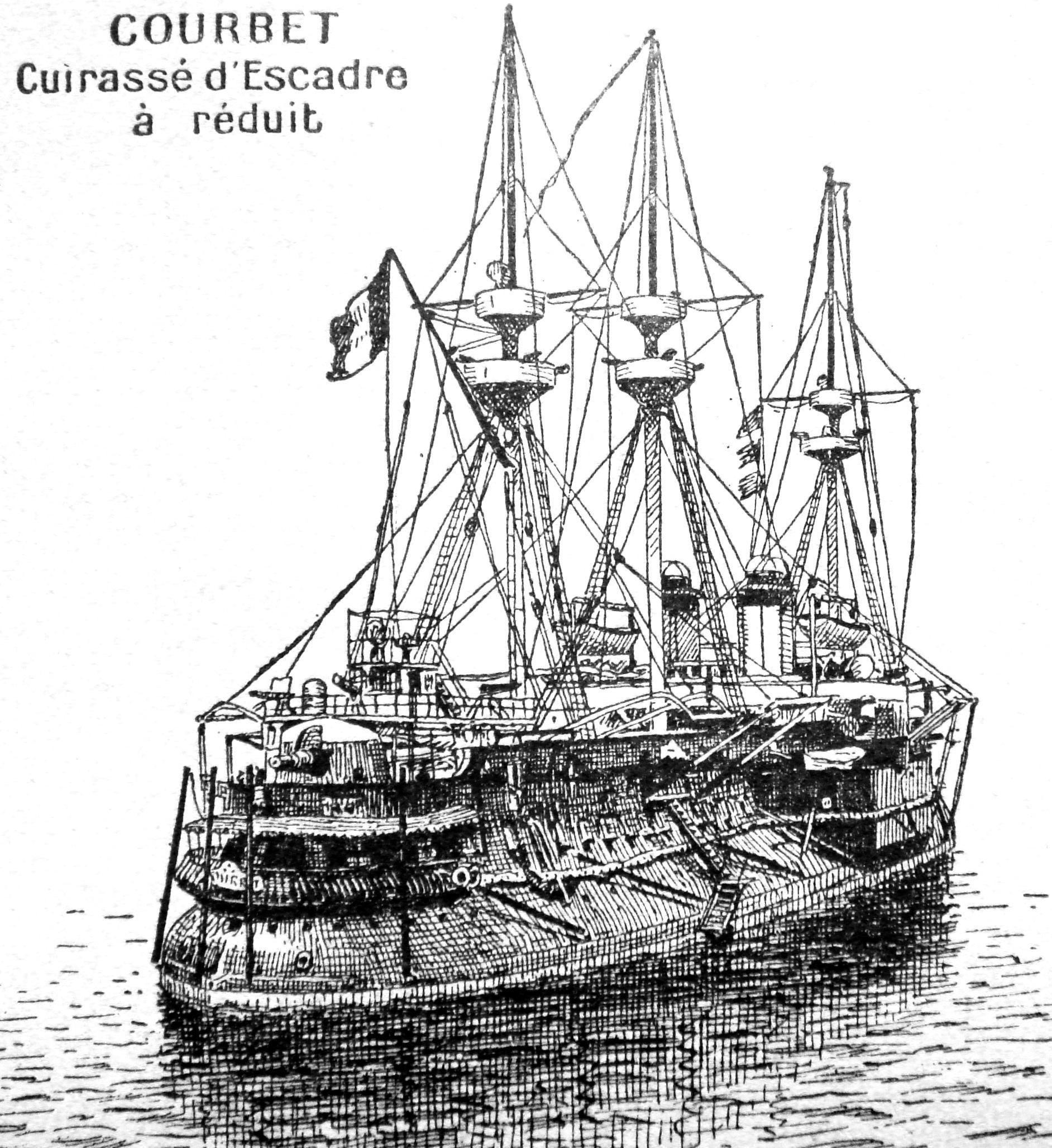 Cuirasse_d'escadre_Courbet